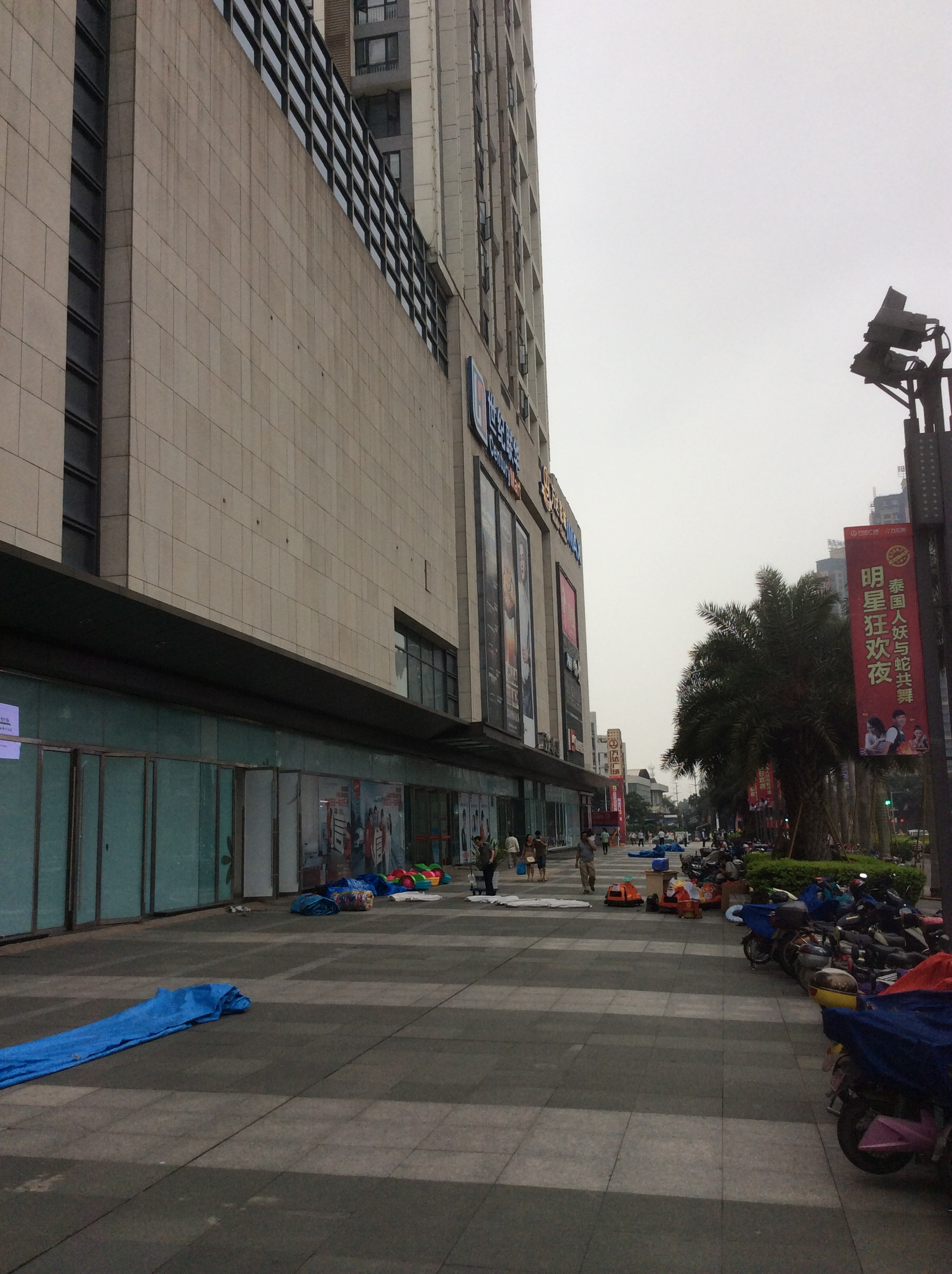 位于福州台江的一家万达广场